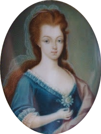 D. Leonor Tomásia de Távora, 3.ª Marquesa de Távora. Decapitada durante o Processo dos Távoras, em 1759.